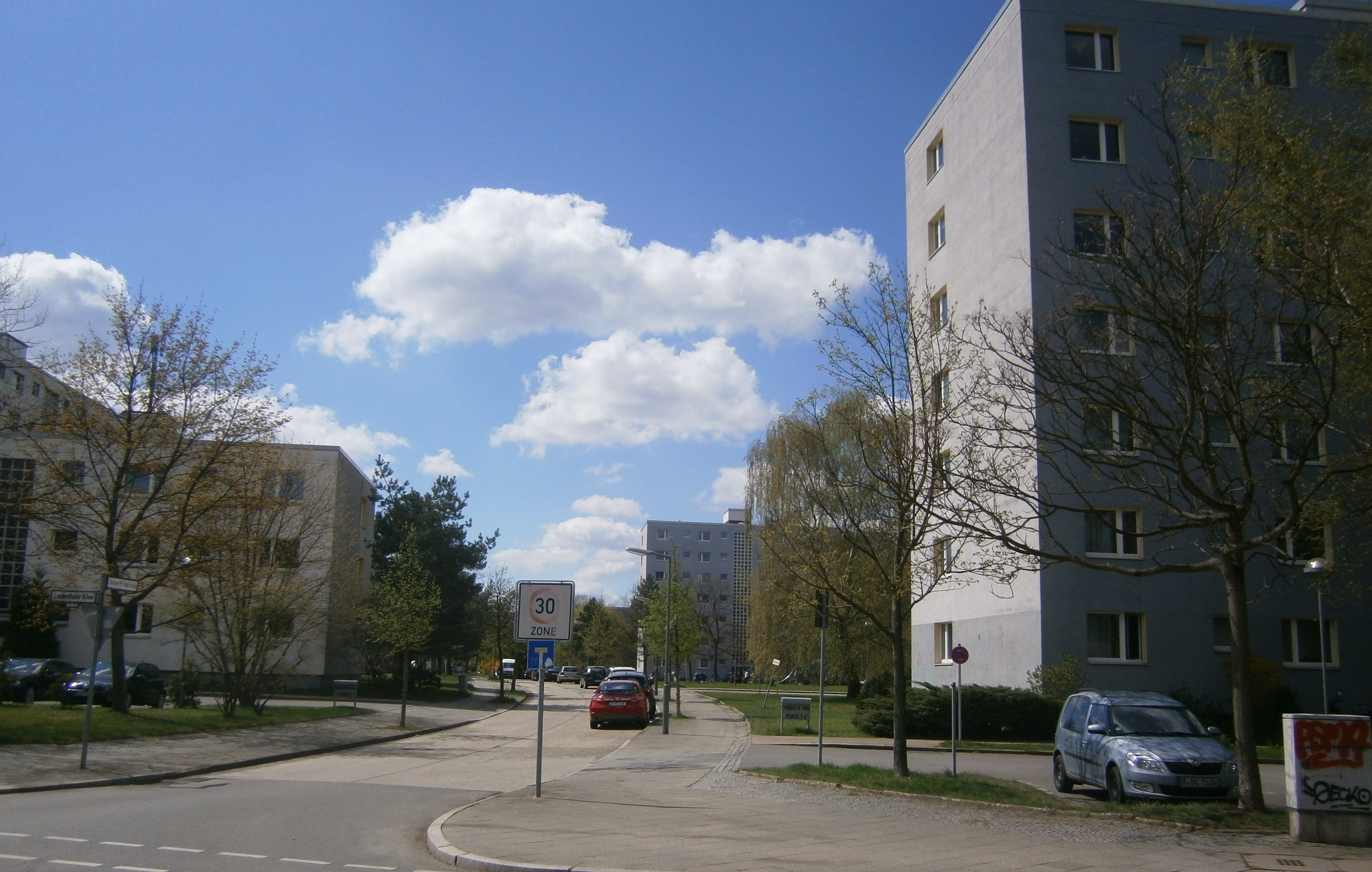 Charles-H.-King-Straße ist eine Straße im Ortsteil Berlin-Nikolassee (hier in Blickrichtung: West)